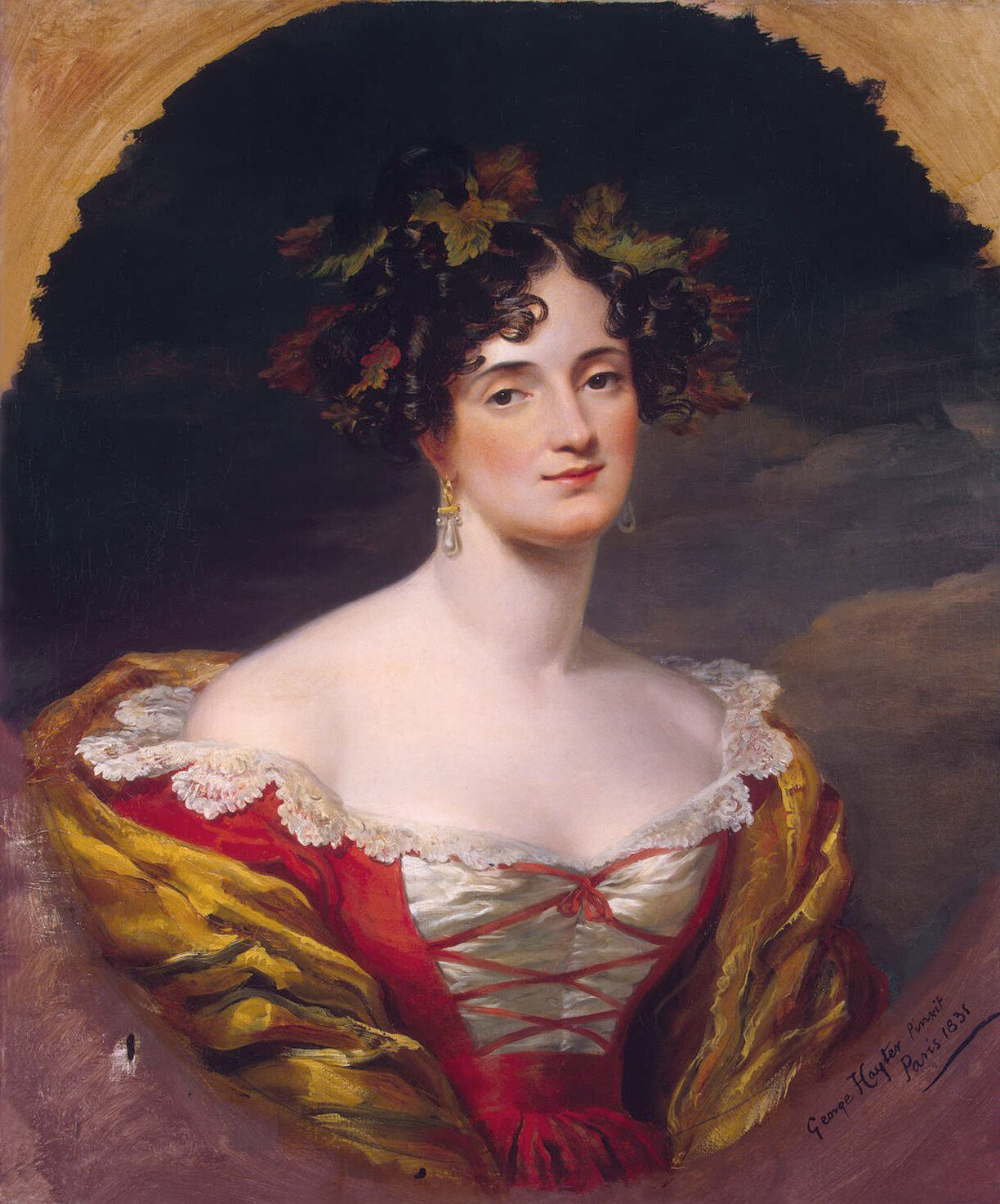 Софья Станиславовна Киселёва. ур. Потоцкая (1801-1875)